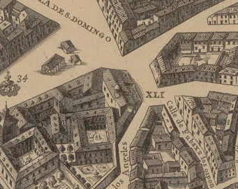 Plano de Teixeira conservado en el Instituto Geográfico Nacional